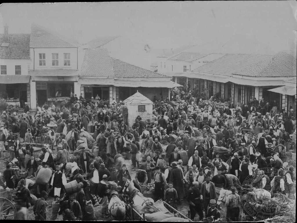 Житният пазар в Битоля